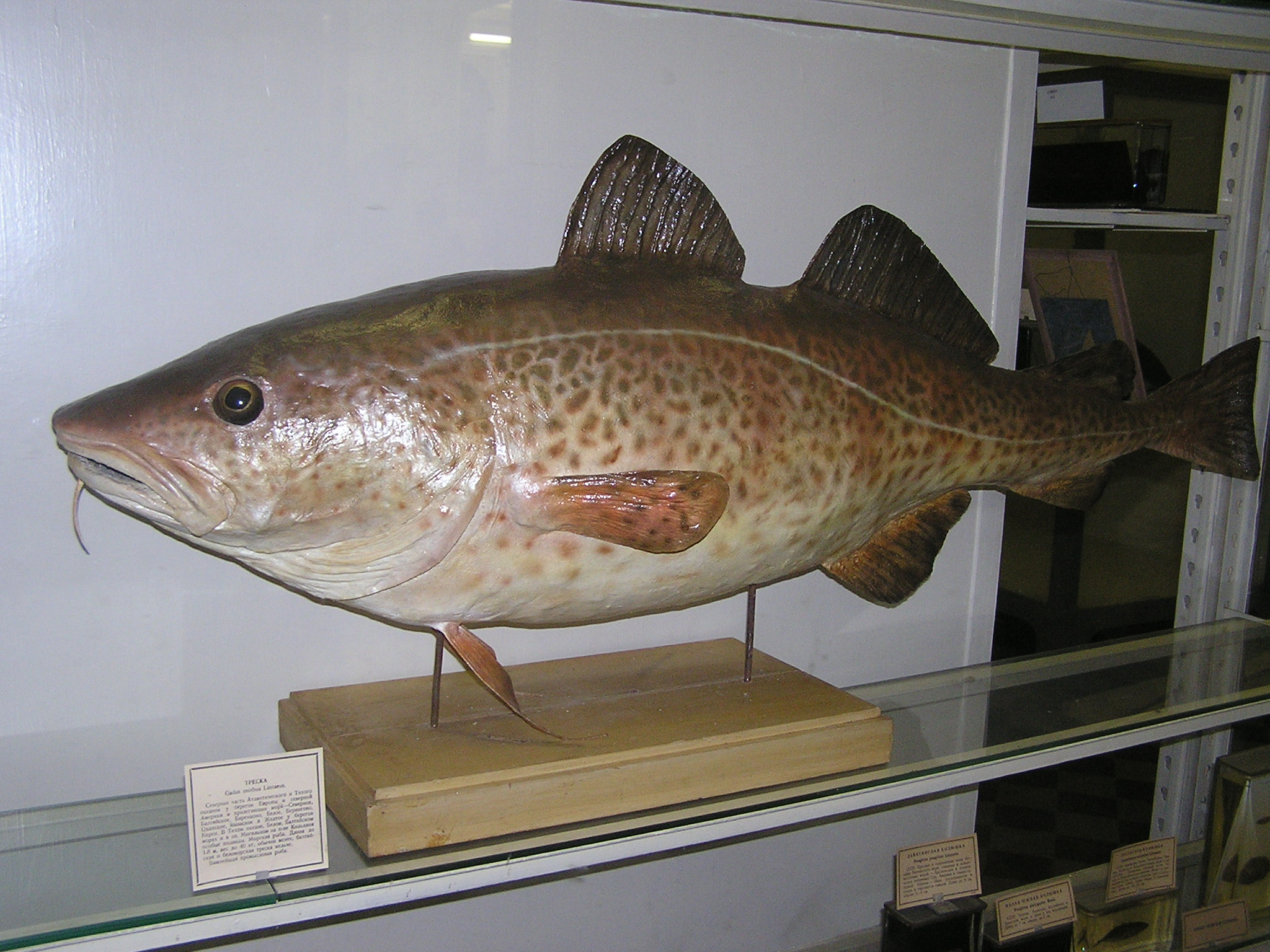 Зоологический музей в Санкт-Петербурге. Треска